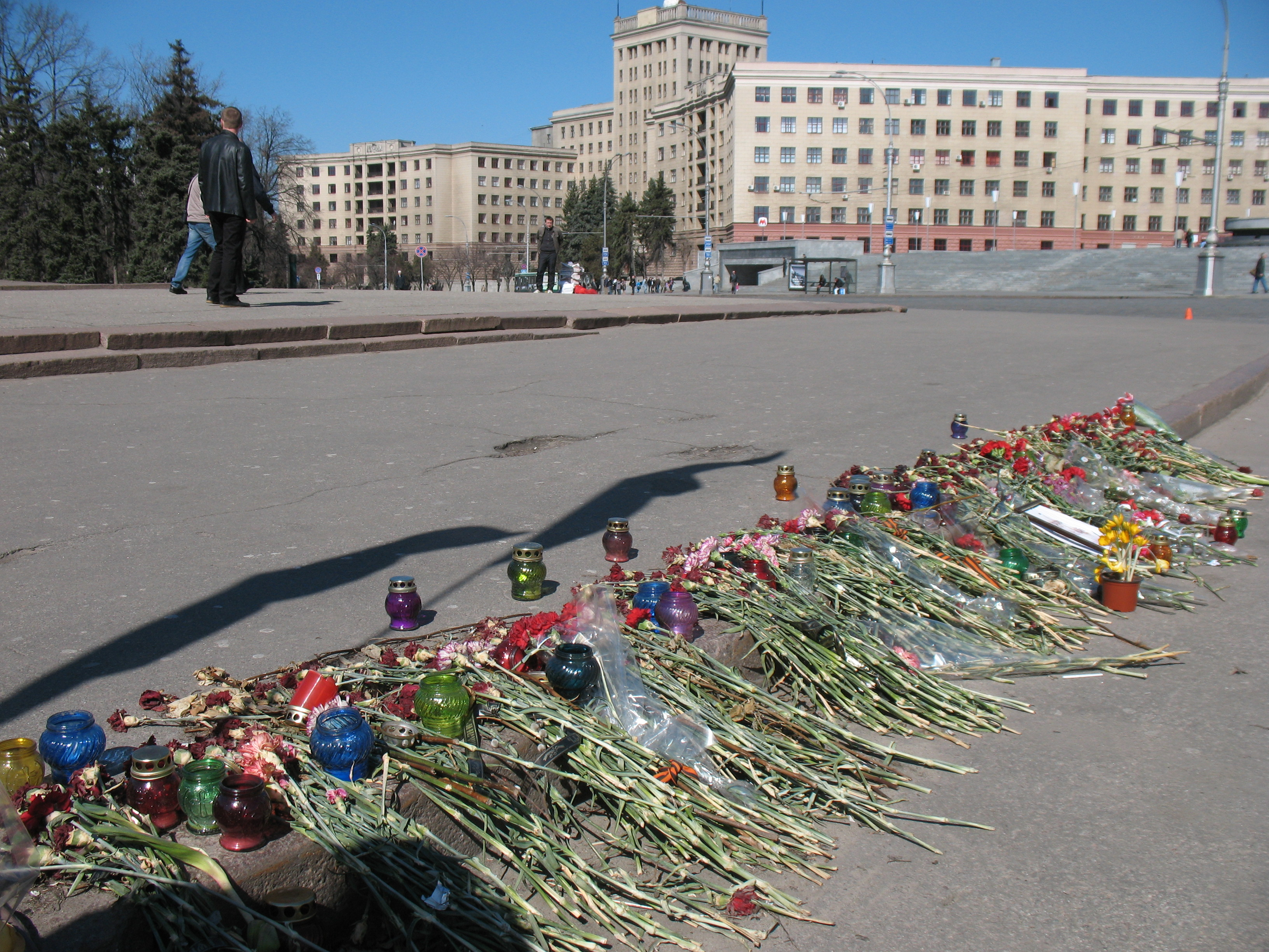 Харьков, 23 марта. Памяти убитых нападающих на "Просвіту" (ул. Рымарская) ночью 15 марта (убиты двое, в т.ч. росиянин, тяжело ранены пятеро) и убитых бойцов «Беркута». Лампады и цветы. Площадь Свободы.